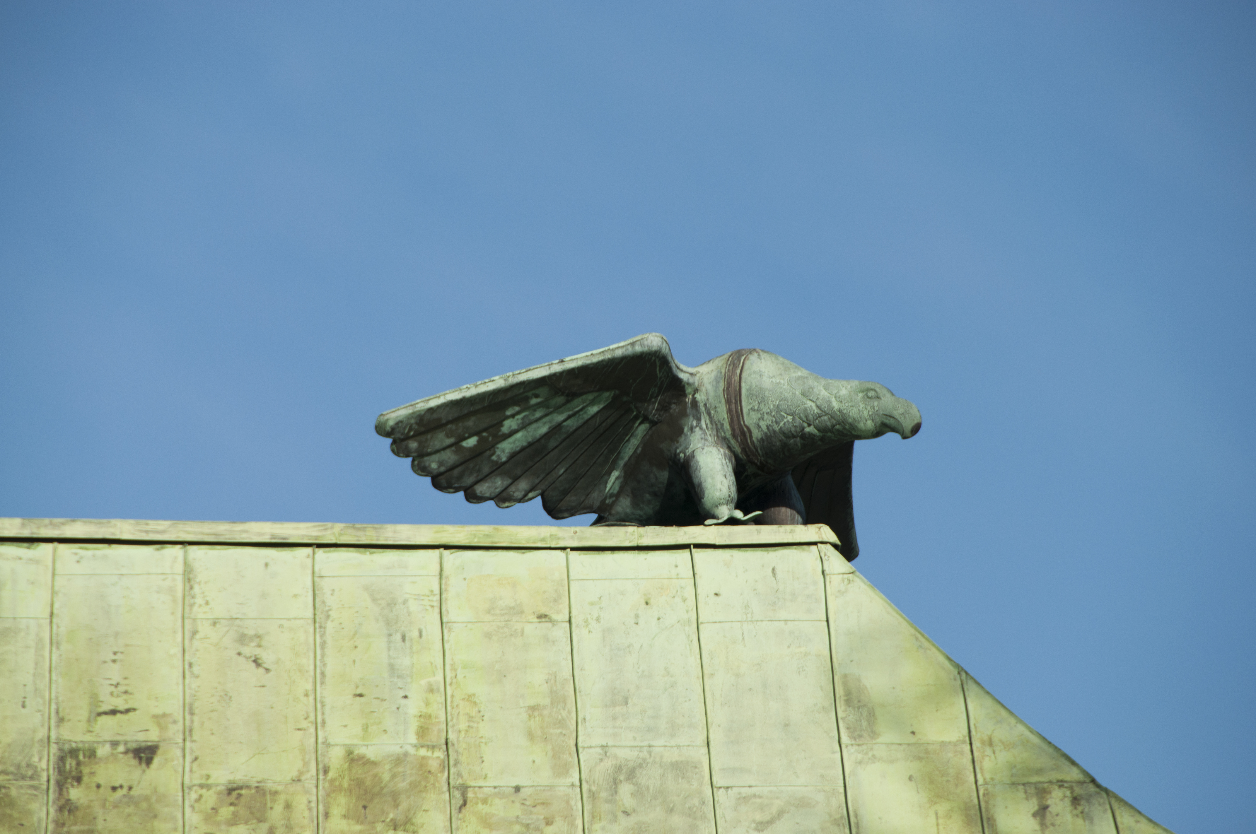 Örn på Värmlands museum. Fritt driven i koppar av konstsmeden Karl Magnusson i Gunnarskog. Utarbetade efter en modell i skala 1/10 av bildhuggarbröderna Gustaf Sandberg och Aron Sandberg